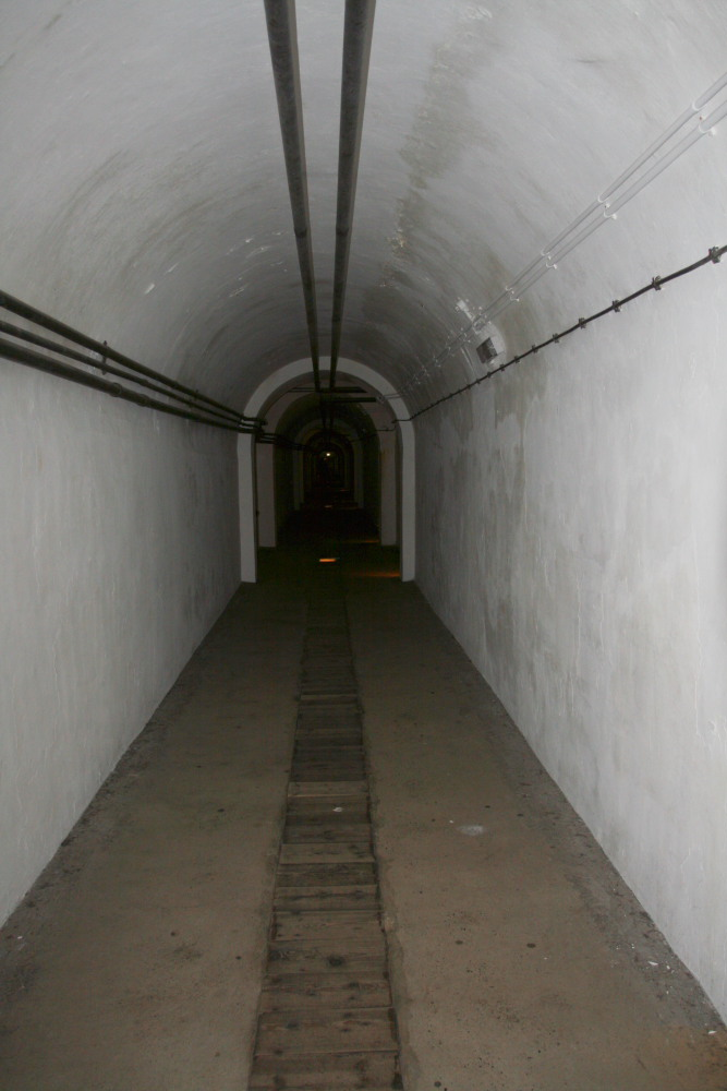 Hohlgangsanlage 8, St. Peter's Valley, Jersey.